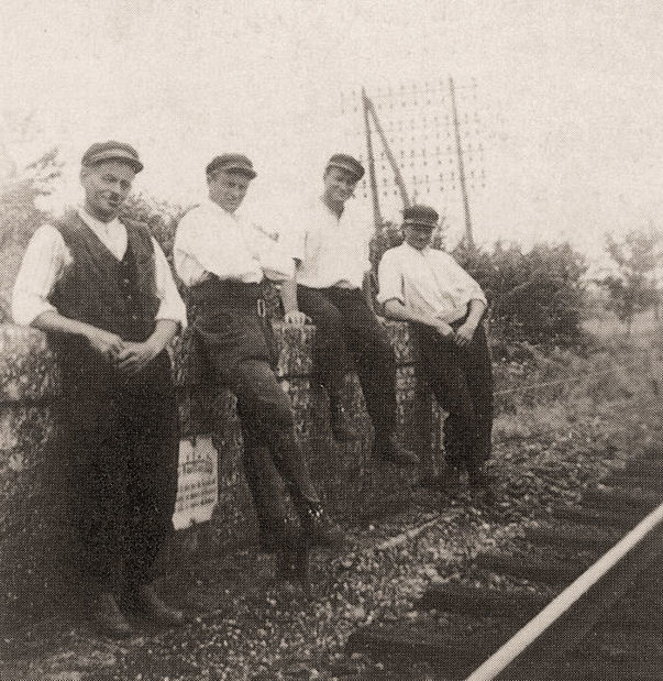 Une équipe de cantonniers de la Cie du Nord sur la ligne de Montérolier-Buchy à saint-Saëns